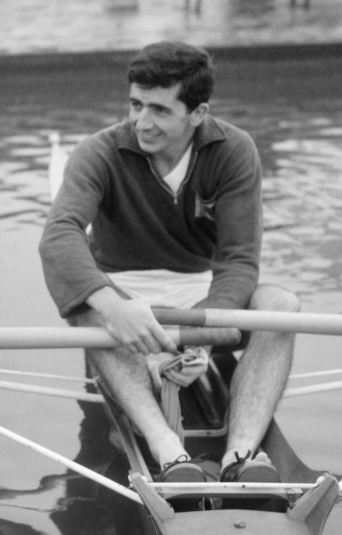 Training Europese roeikampioenschappen, skiffeur W. C. Barry (Engeland) met vader (coach)